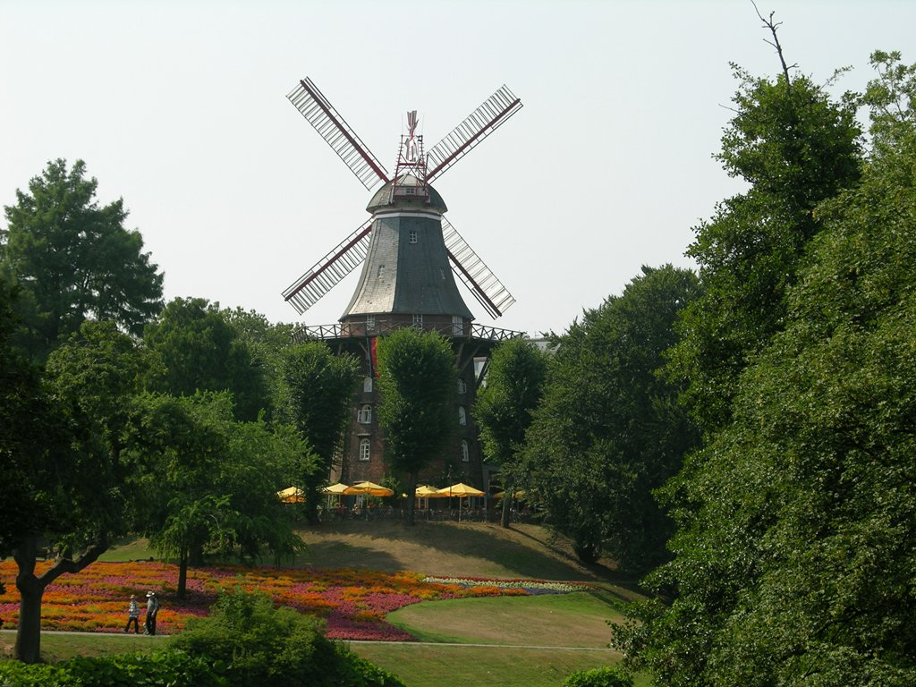 Mühle am Wall, Bremen